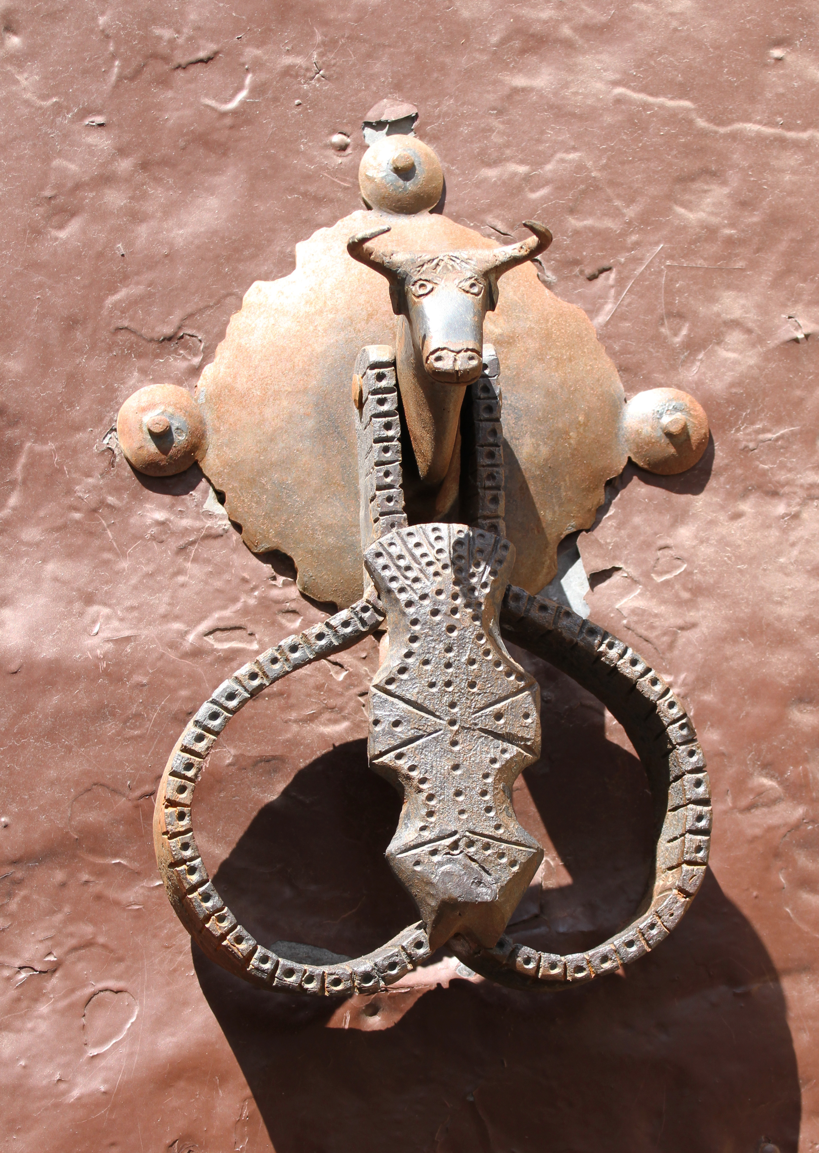 Doorknocker Ronda Bullring, Málaga.